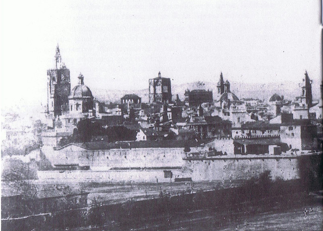 Ciudadela de Valencia en una imagen del siglo XIX antes de la demolición de las murallas de la ciudad en el citado siglo.